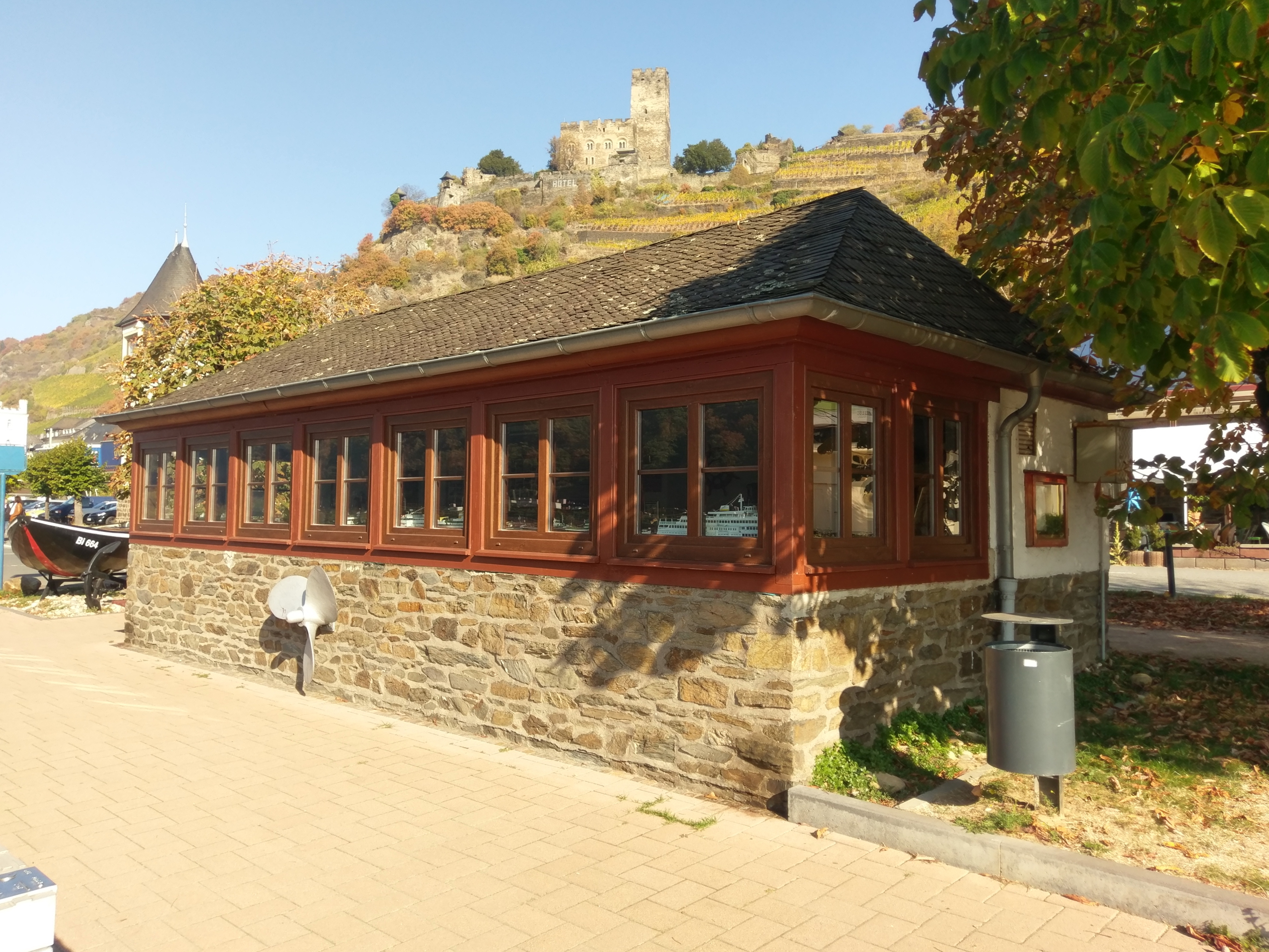 Lotsenmuseum in der ehemaligen Lotsenstation in Kaub am Rhein. Im HIntergrund Burg Gutenfels.